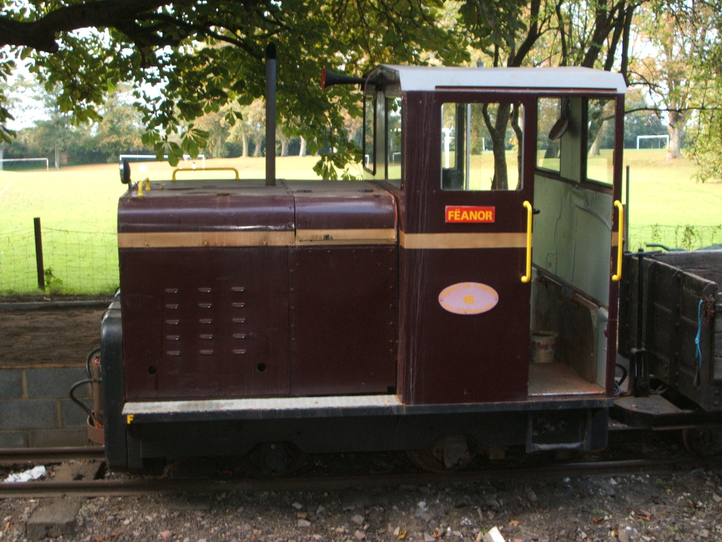 Diesel Engine Fëanor at LBNGR